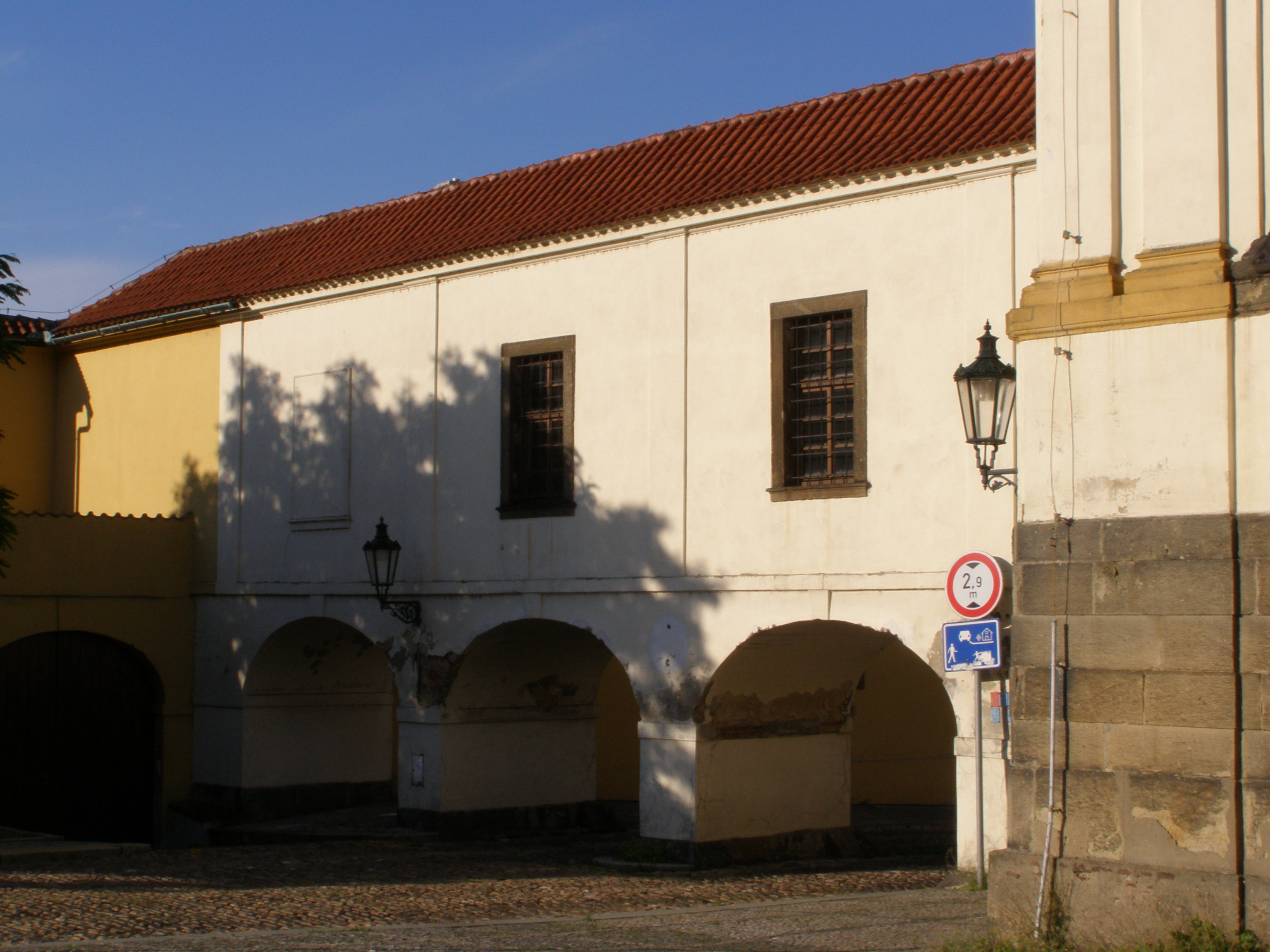 Praha, Hradčany, Loreta, spojovací chodba s klášterem kapucínů